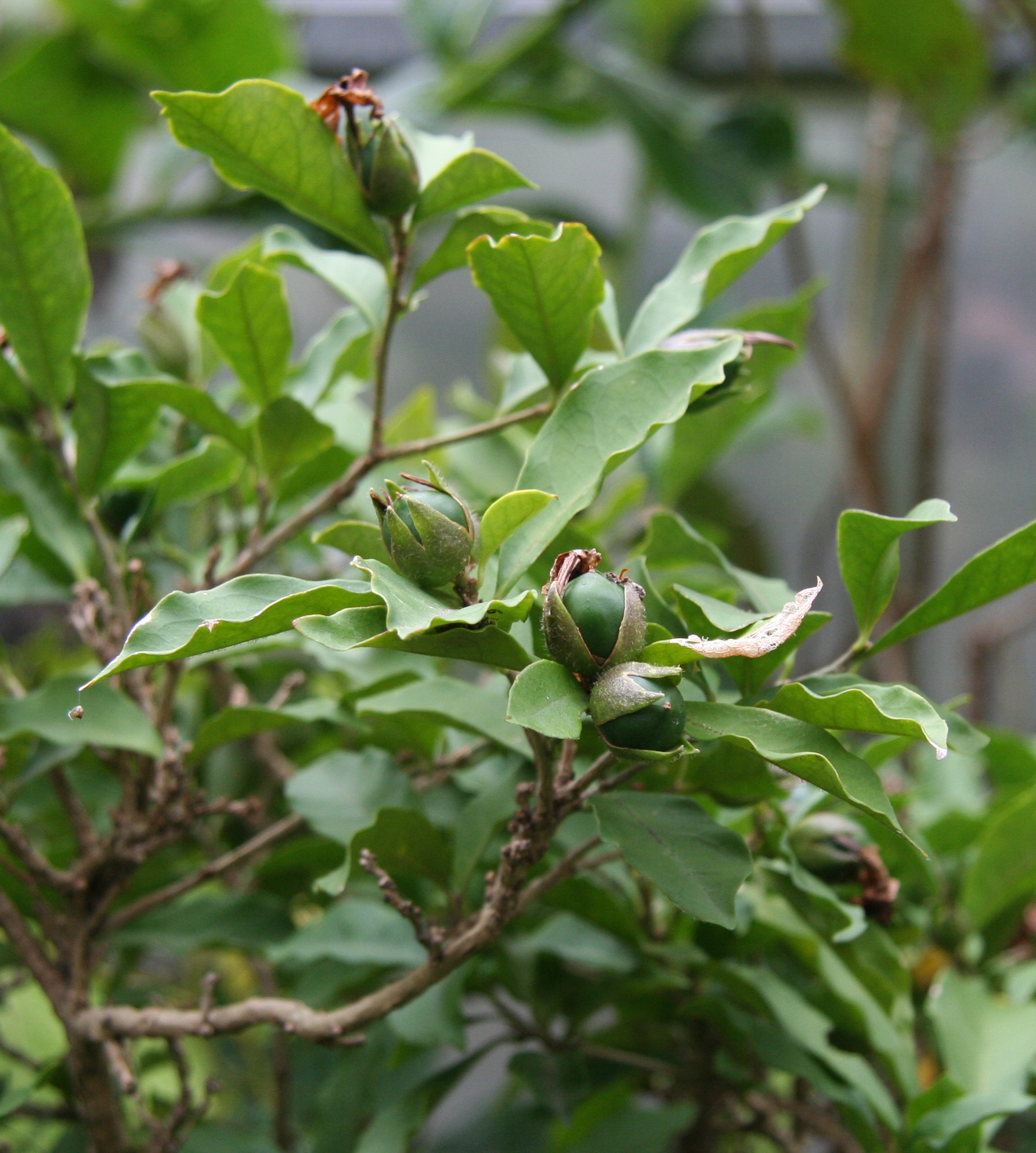 Früchte von Brunfelsia uniflora im Botanischen Garten Dresden